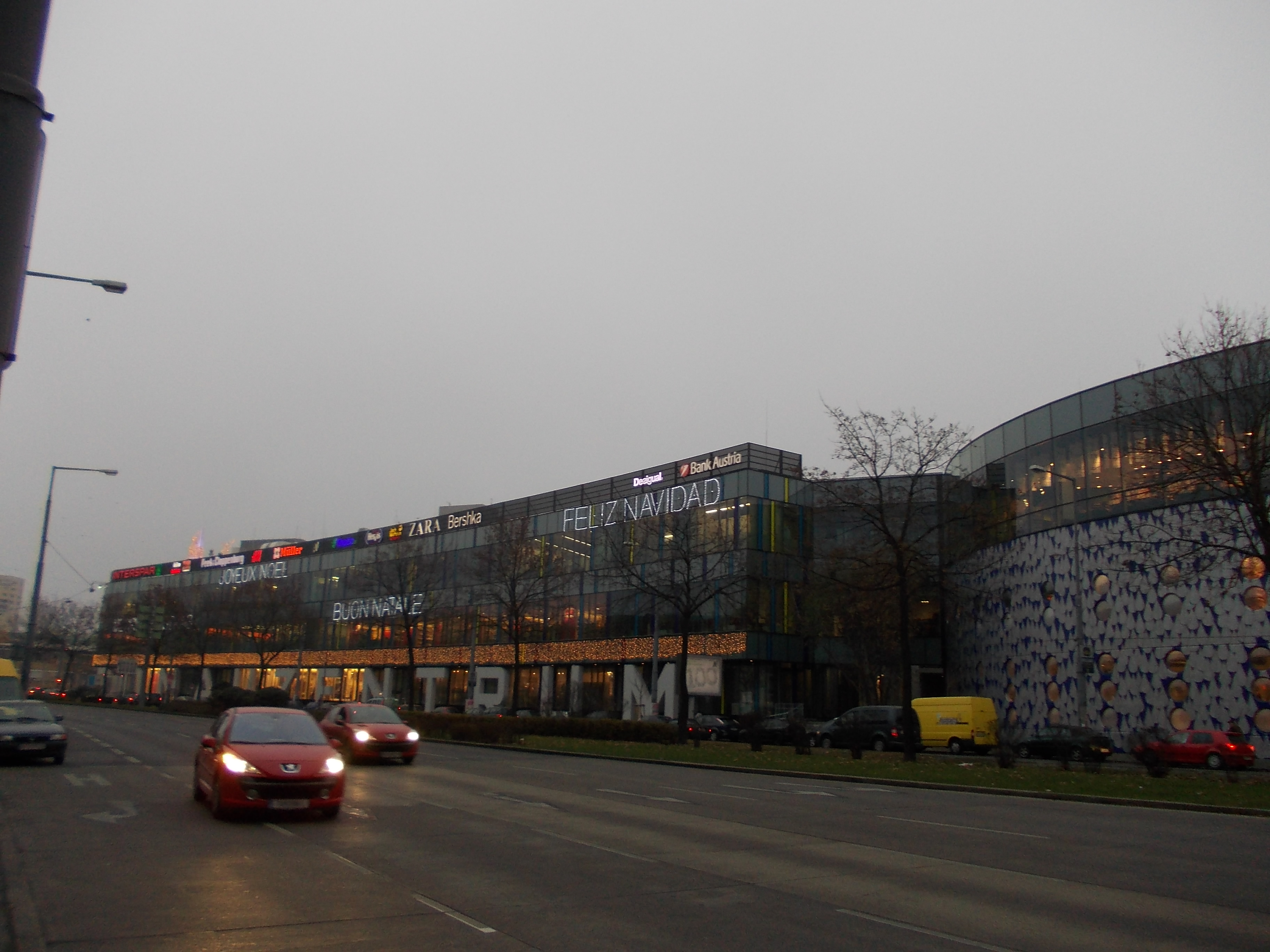 Donauzentrum